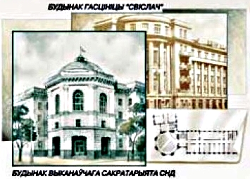 Здания в Минске, построенные по проекту архитектора Александра Воинова. Фрагмент конверта Белпочты 2007 года. Художник Микола Рыжий.